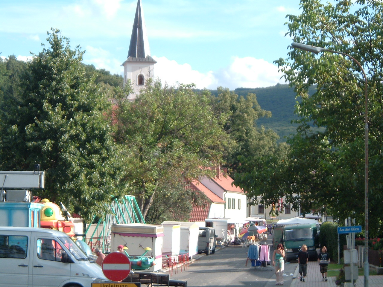 Rattersdorf, Burgenland, Austria